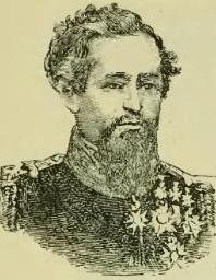 Hilário Maximiniano Antunes Gurjão.